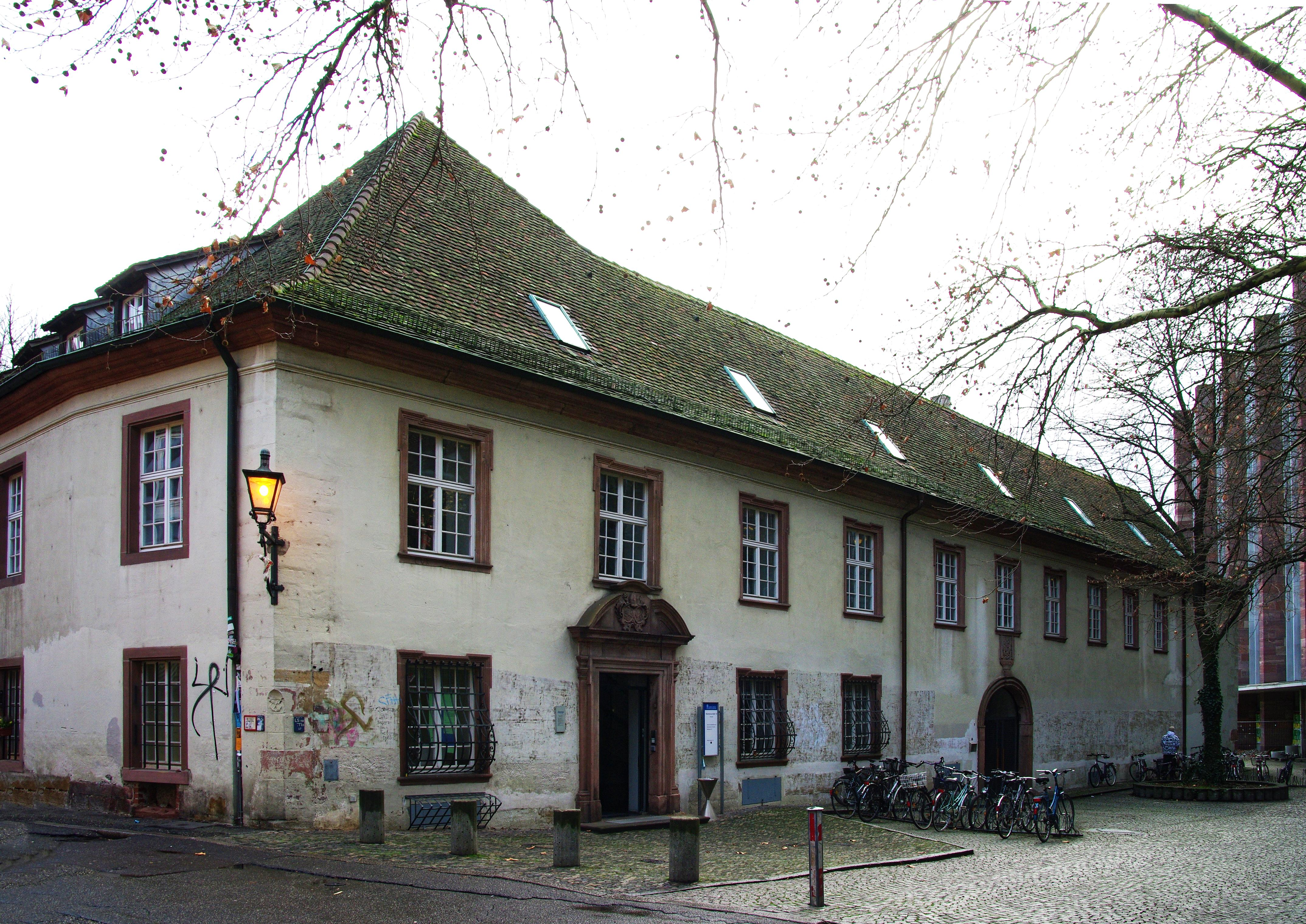 Der Peterhof mit der Peterhofkapelle im rechten Teil des Gebäudes im ersten Stock